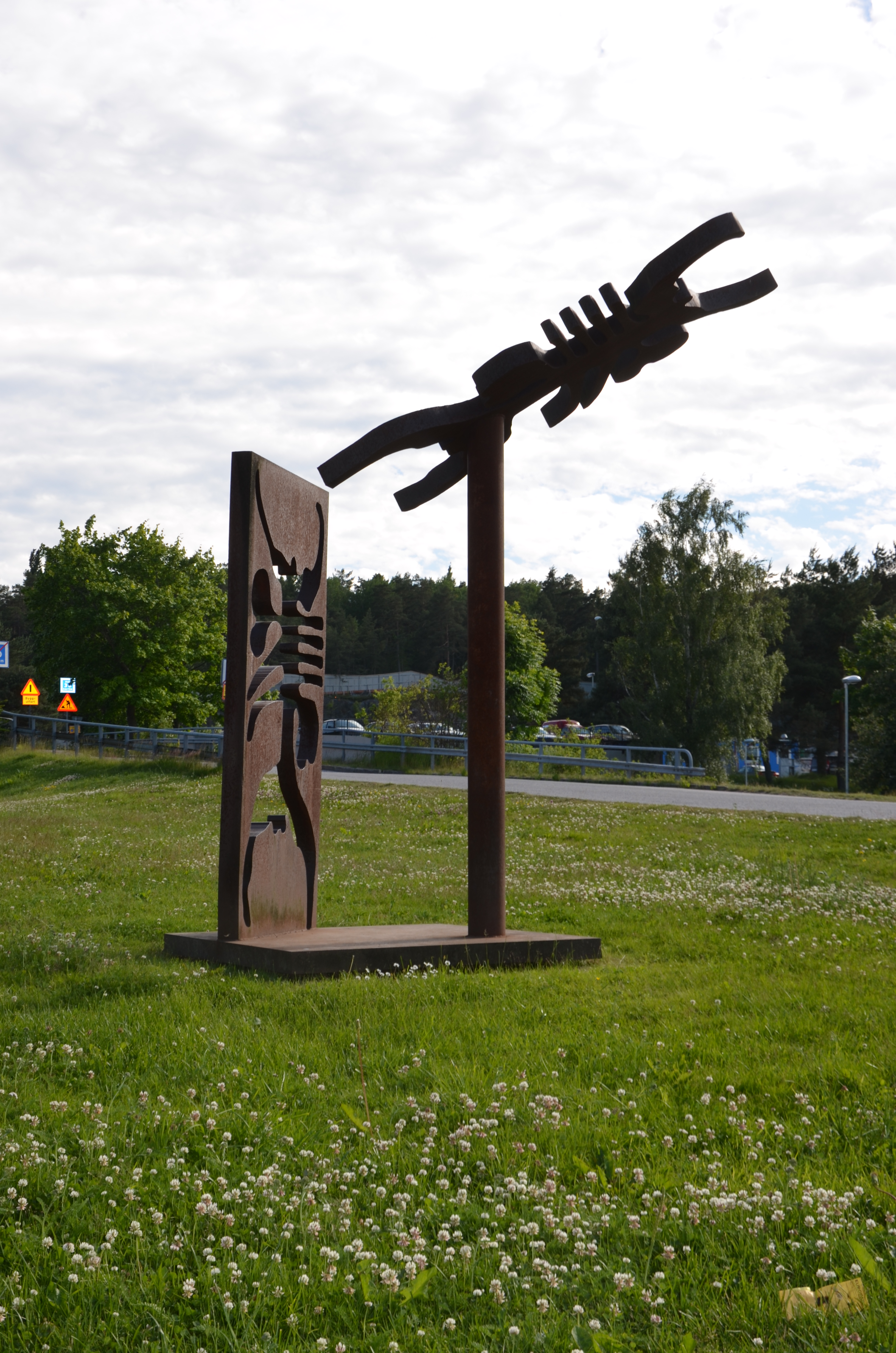 Björn Selders Flygande järnman, cortenstål, Tors väg/Karsbyvägen i Nprsborg i Botkyrka